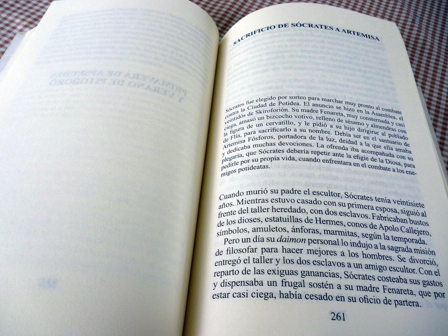 Texto de la página 261 de la edición cubana de El ojo de Cibeles para el artículo El ojo de Cibeles